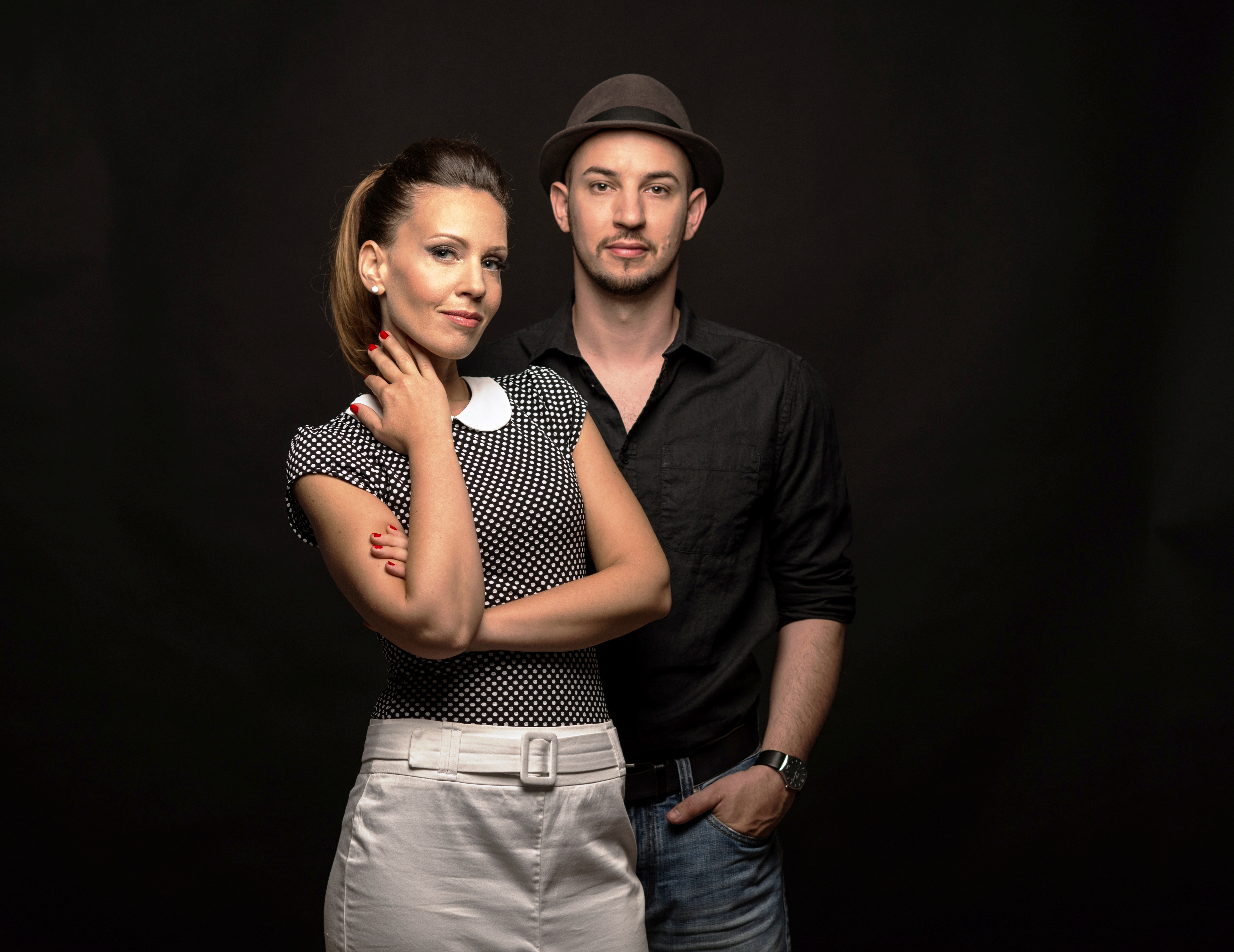 Erika Kertesz & David Reschofsky